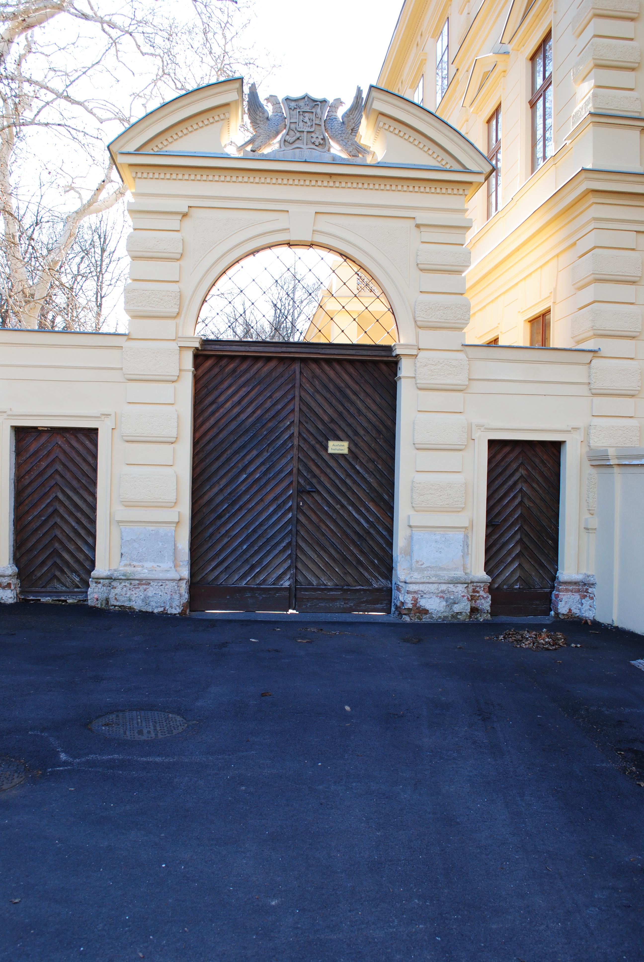 Schloss Hofarnsdorf To mit Wappen